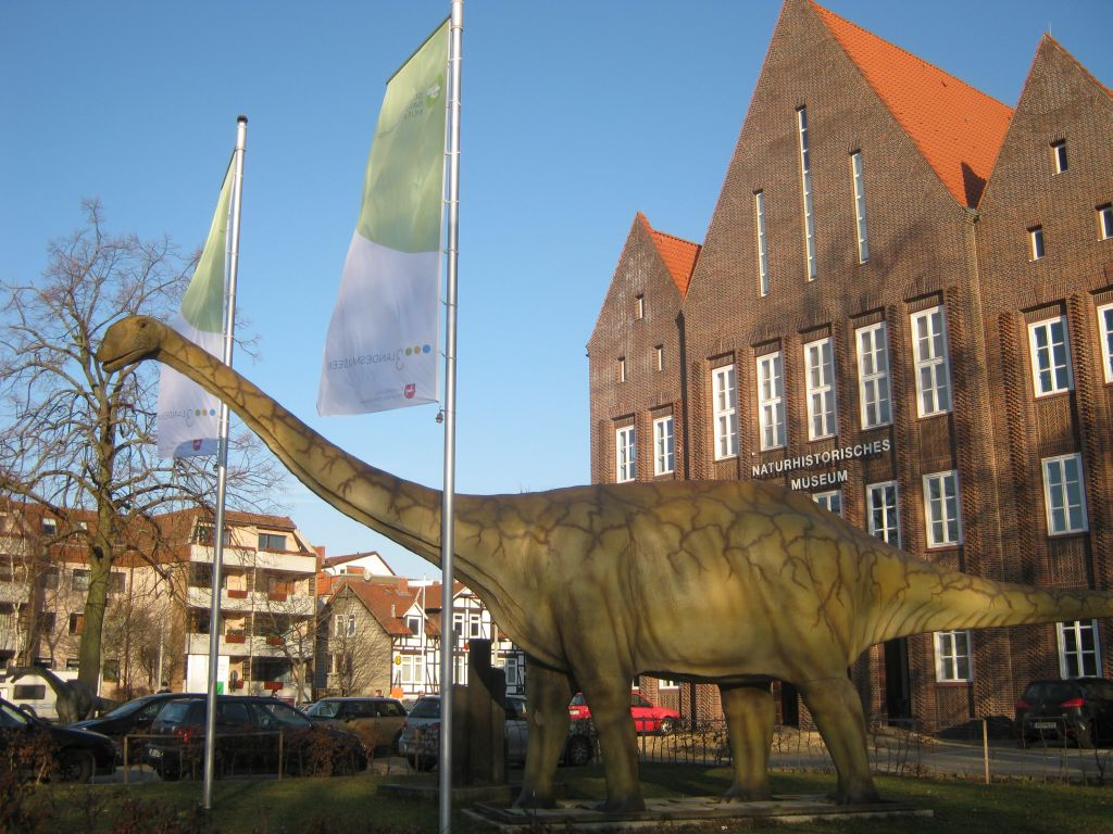 Dinosaurier vor dem Naturhistorischen Museum Braunschweig